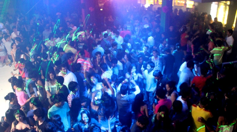 Discotecas en Iquitos